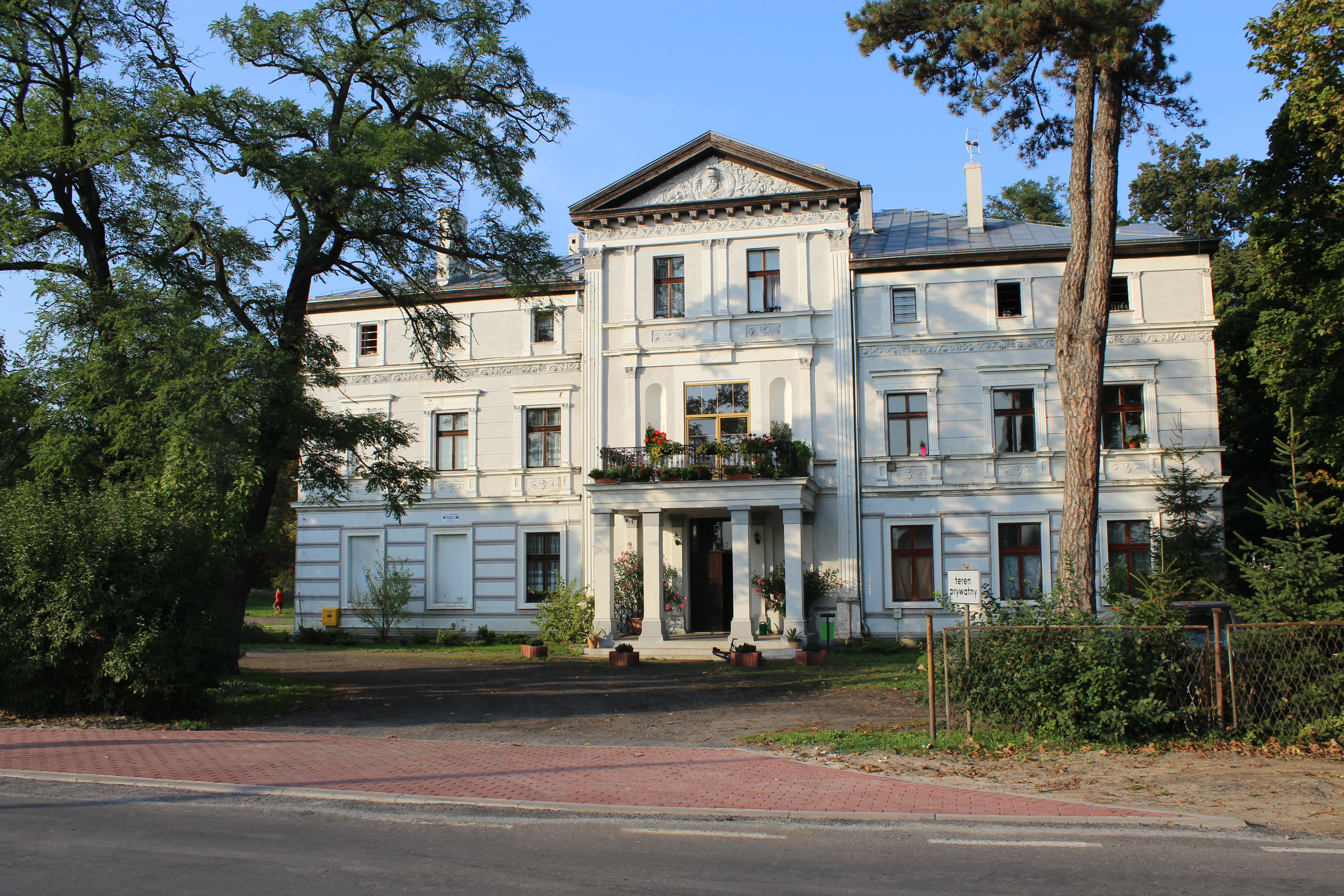 Borek, pałac (nr 14), 1826, 1870